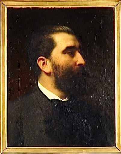 Portrait de José-Maria de Heredia (1842-1905)